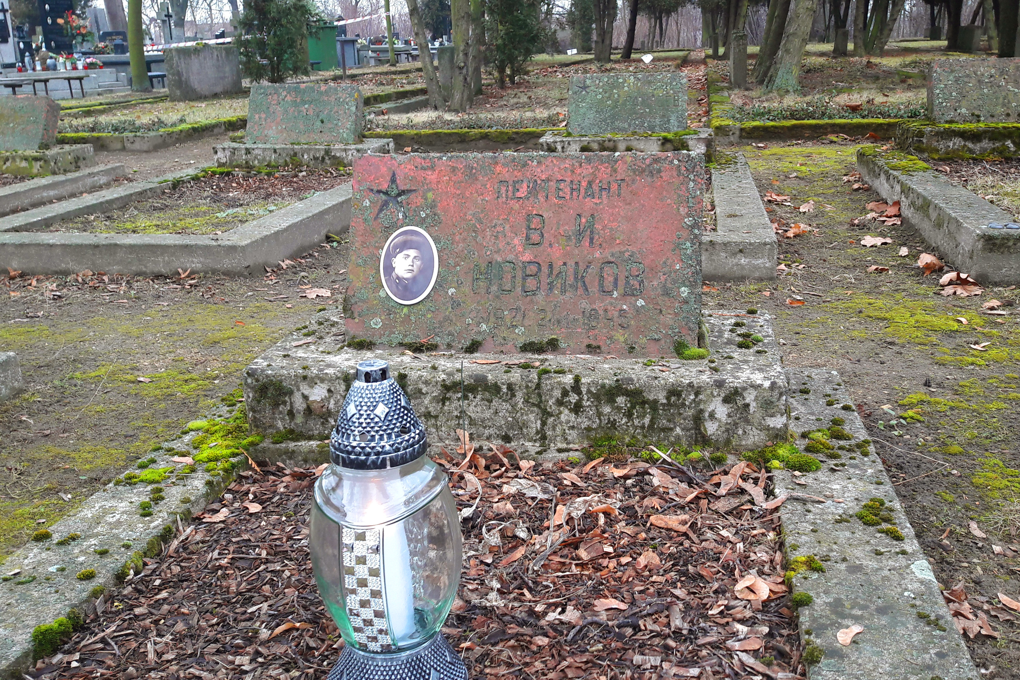 Кладбище Куле, Ченстохова